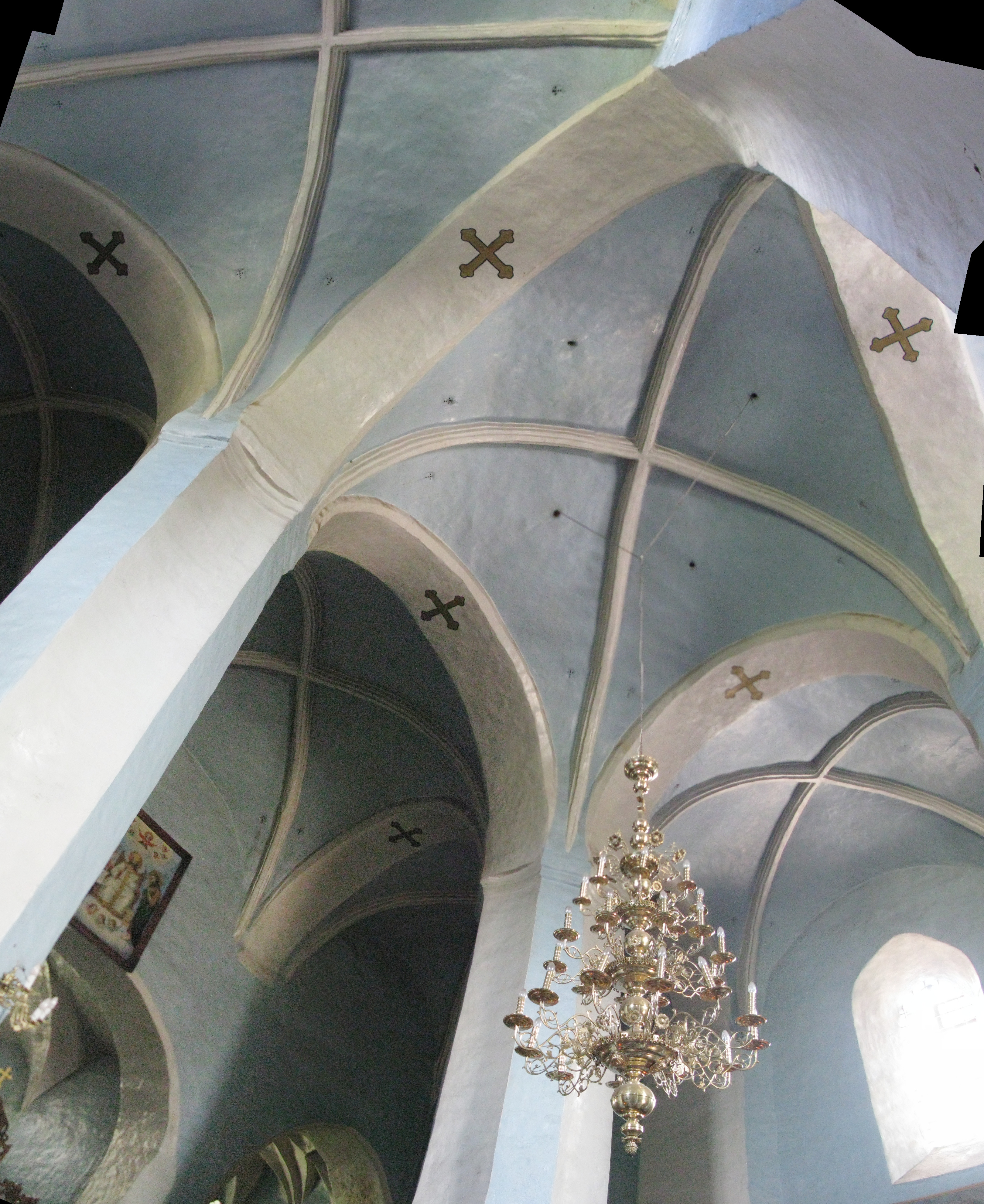 Беларуская (тарашкевіца): Царква абарончага тыпу. в. Сынкавічы This is a photo of Belarusian heritage monument. Reference number: 410Г000282 ( WLM)